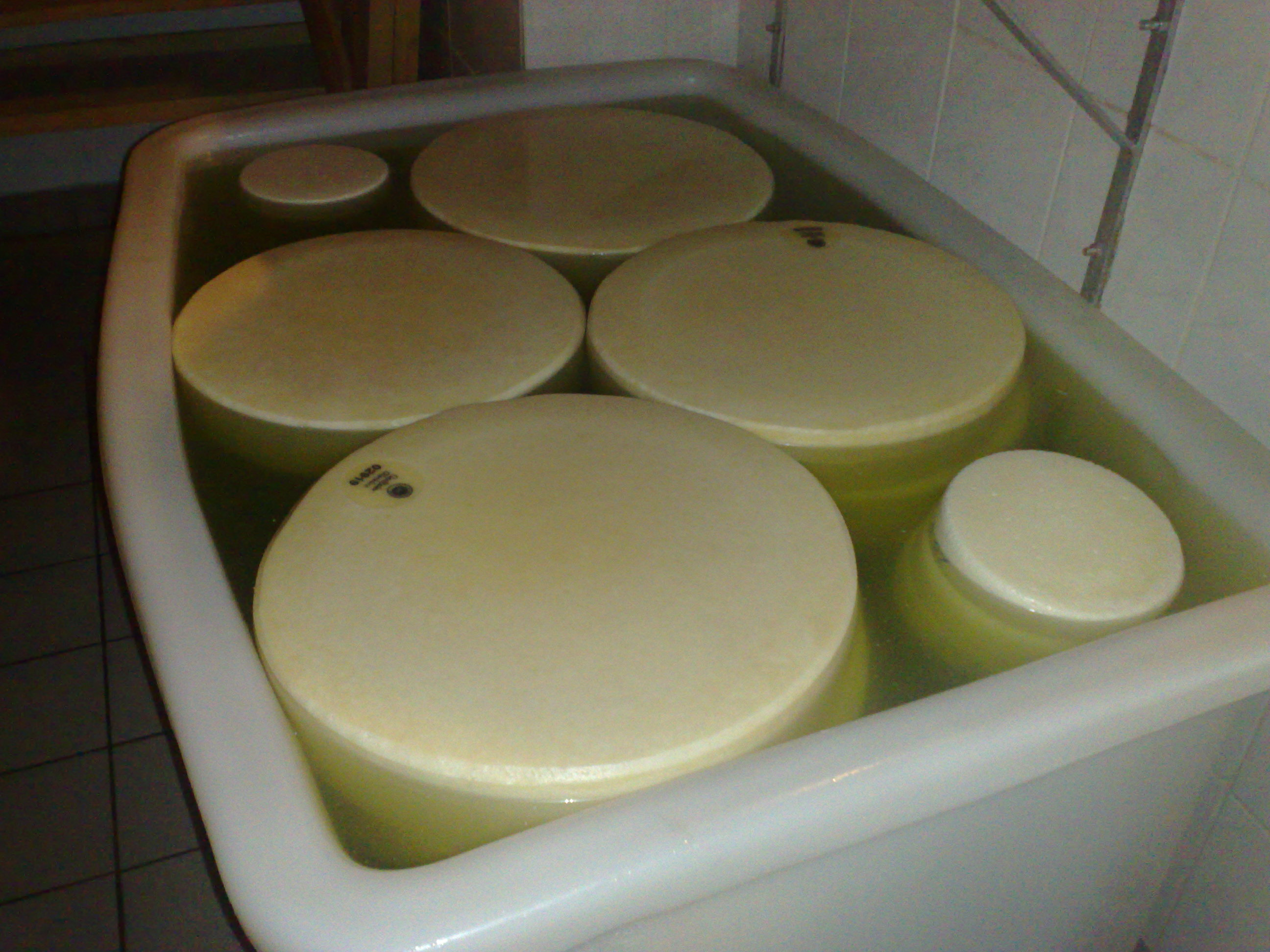 Gailtaler Almkäse g.U. von der Frondell Alm im Salzbad